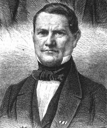 Carl Friedrich Wilhelm Grabow, preußischer Beamter und Abgeordneter, 1862.